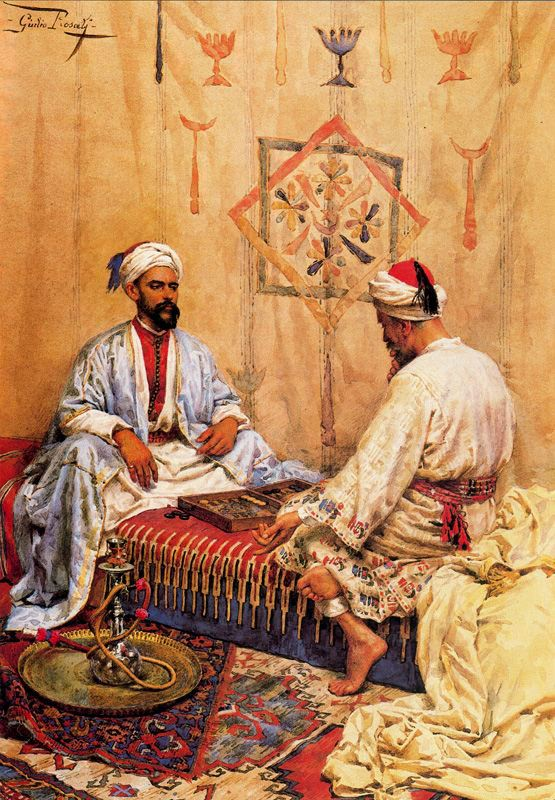 Arabes jouant au tric-trac.